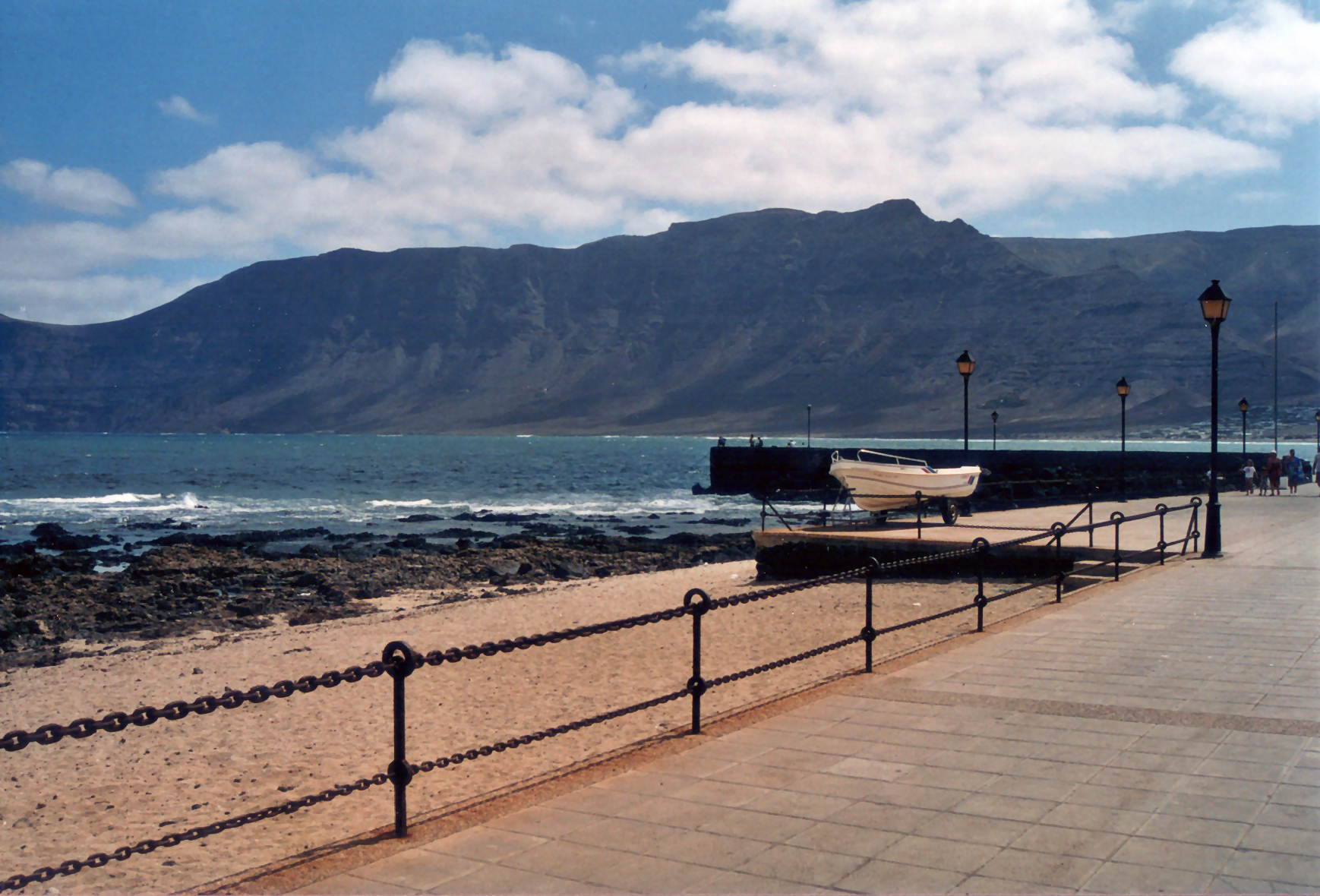 selbst fotografiert 2003